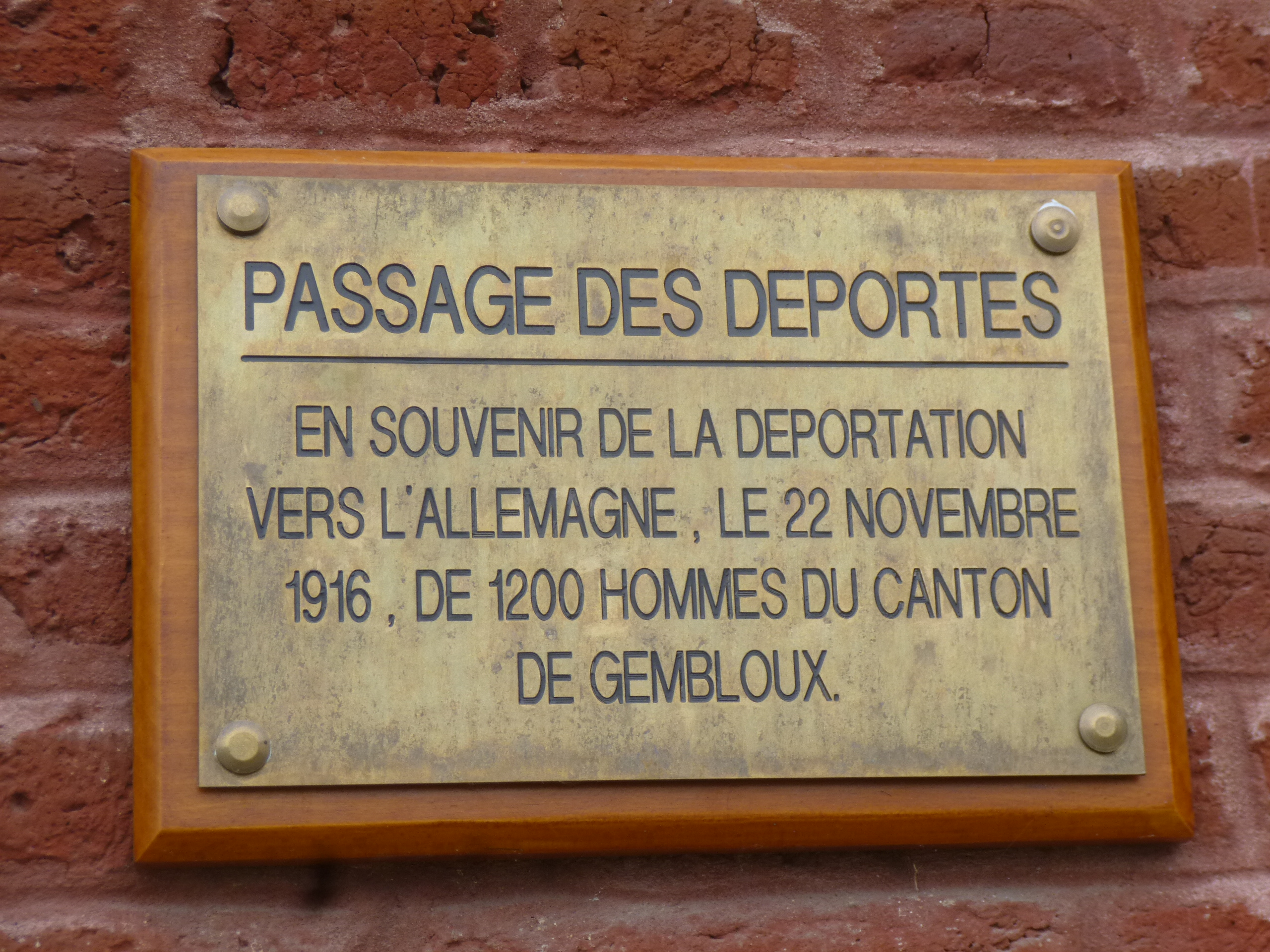 Gembloux Deportation 1916 Plaque